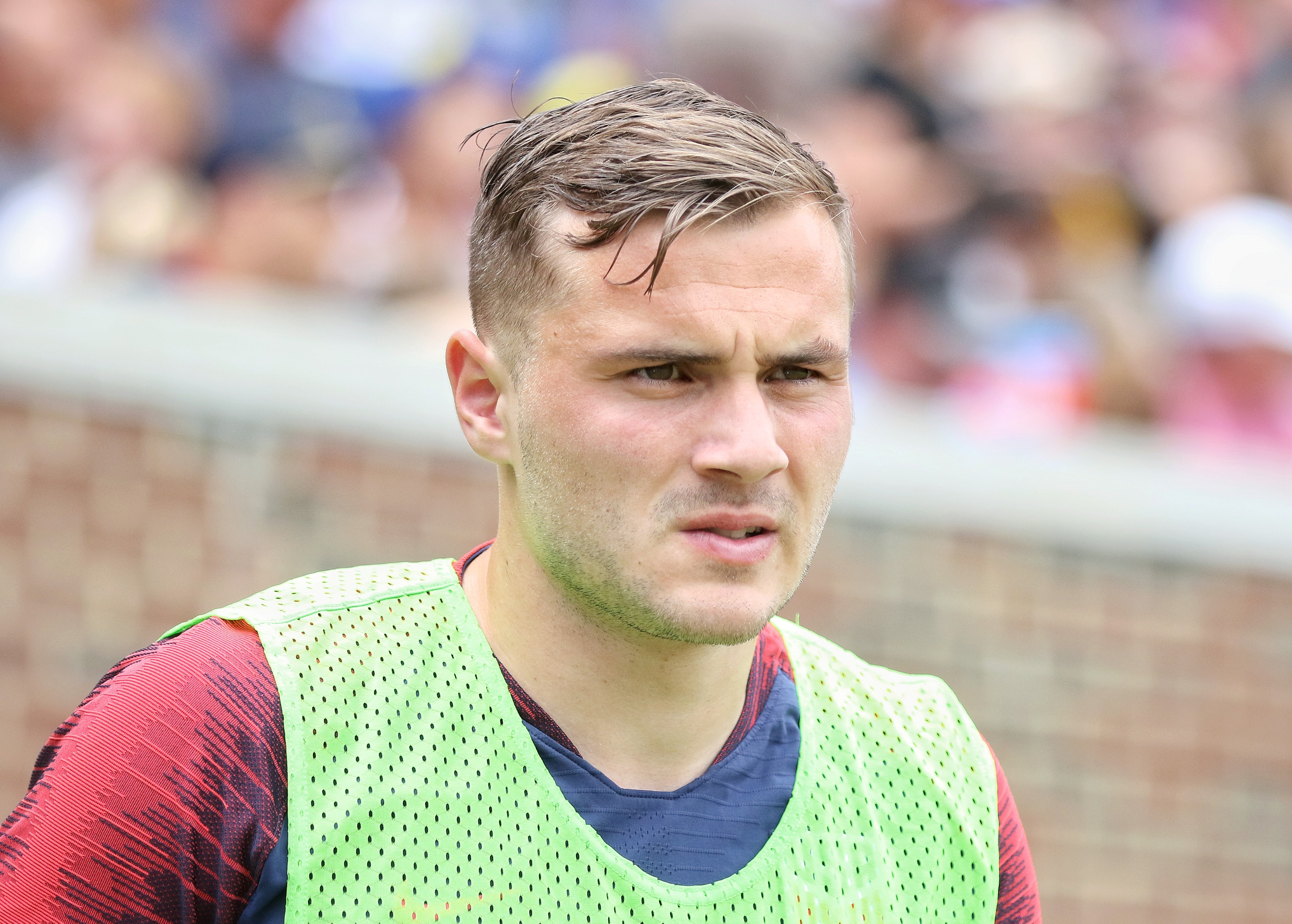 Jordan Morris